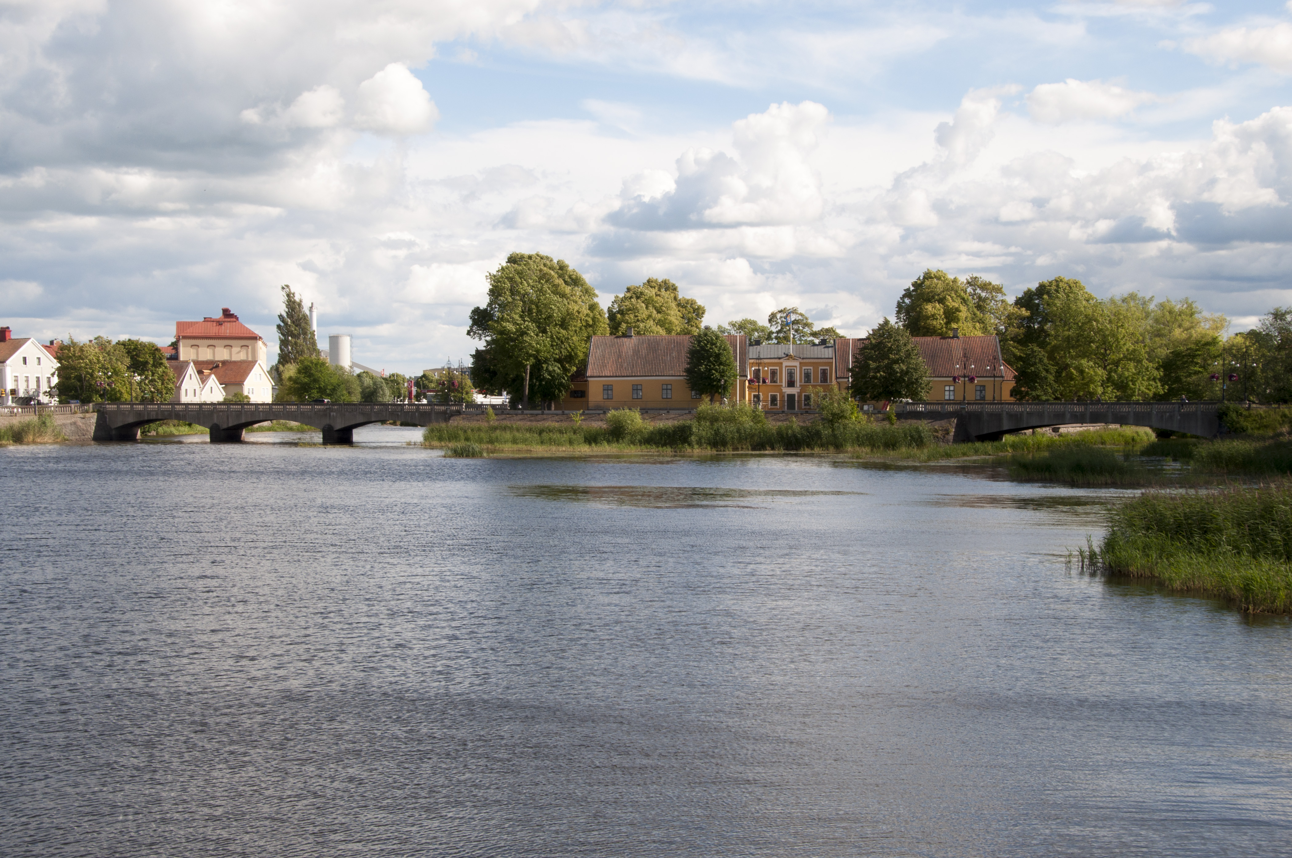 Marieholms slott, Mariestad